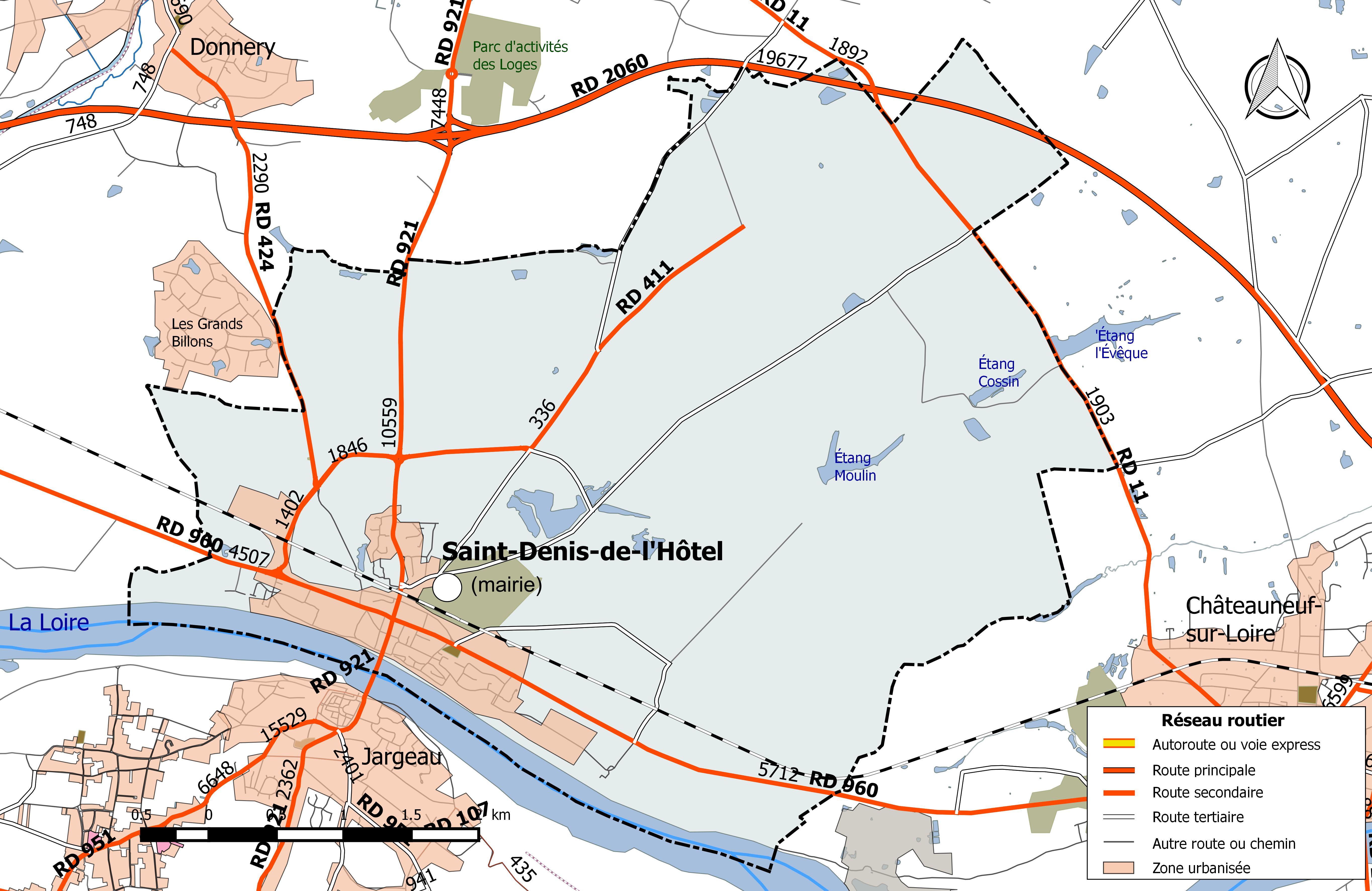 Carte du réseau routier de la commune de Saint-Denis-de-l'Hôtel.